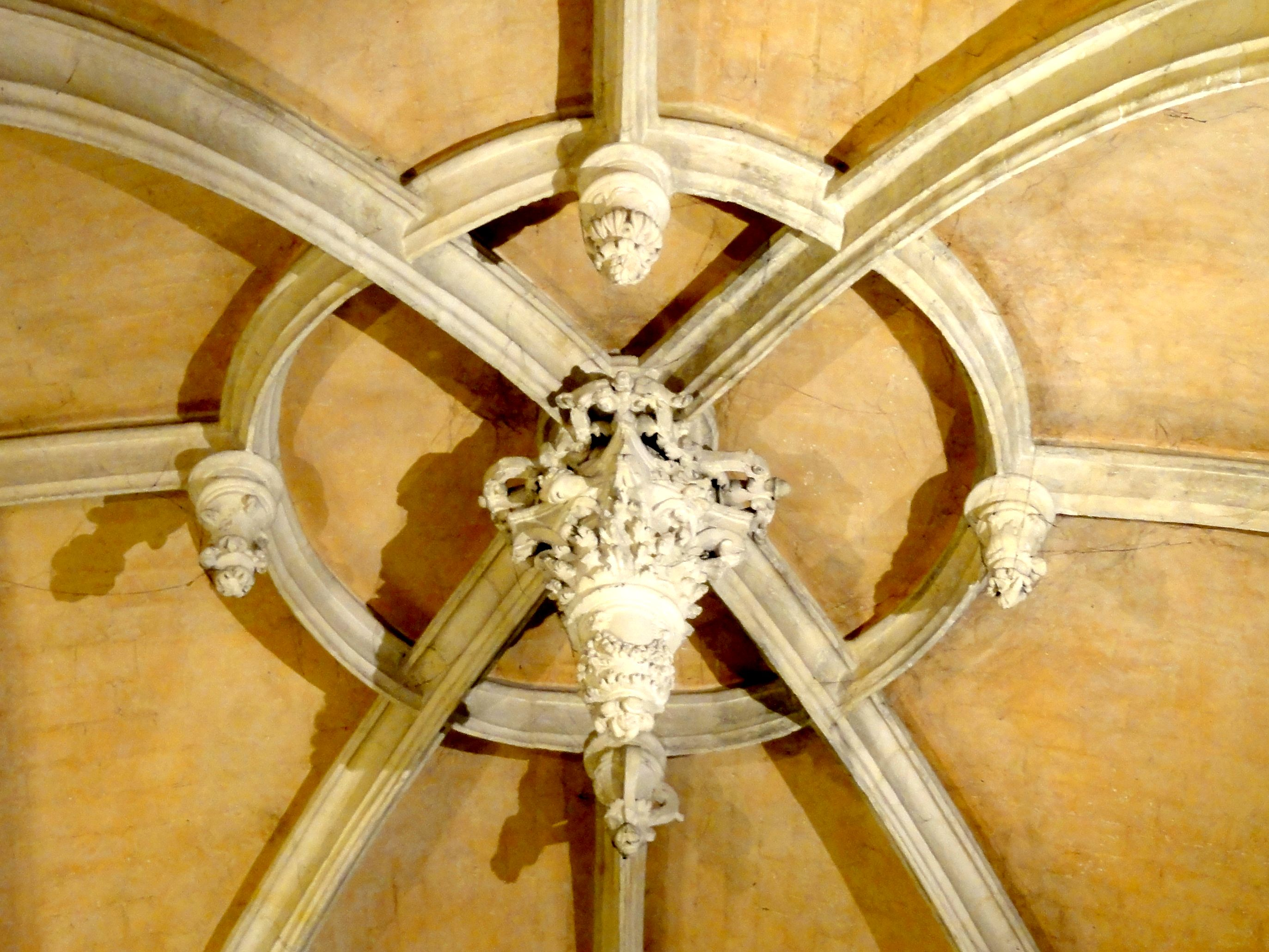 Bas-côté nord, voûte de la 2e travée, clés de voûte.